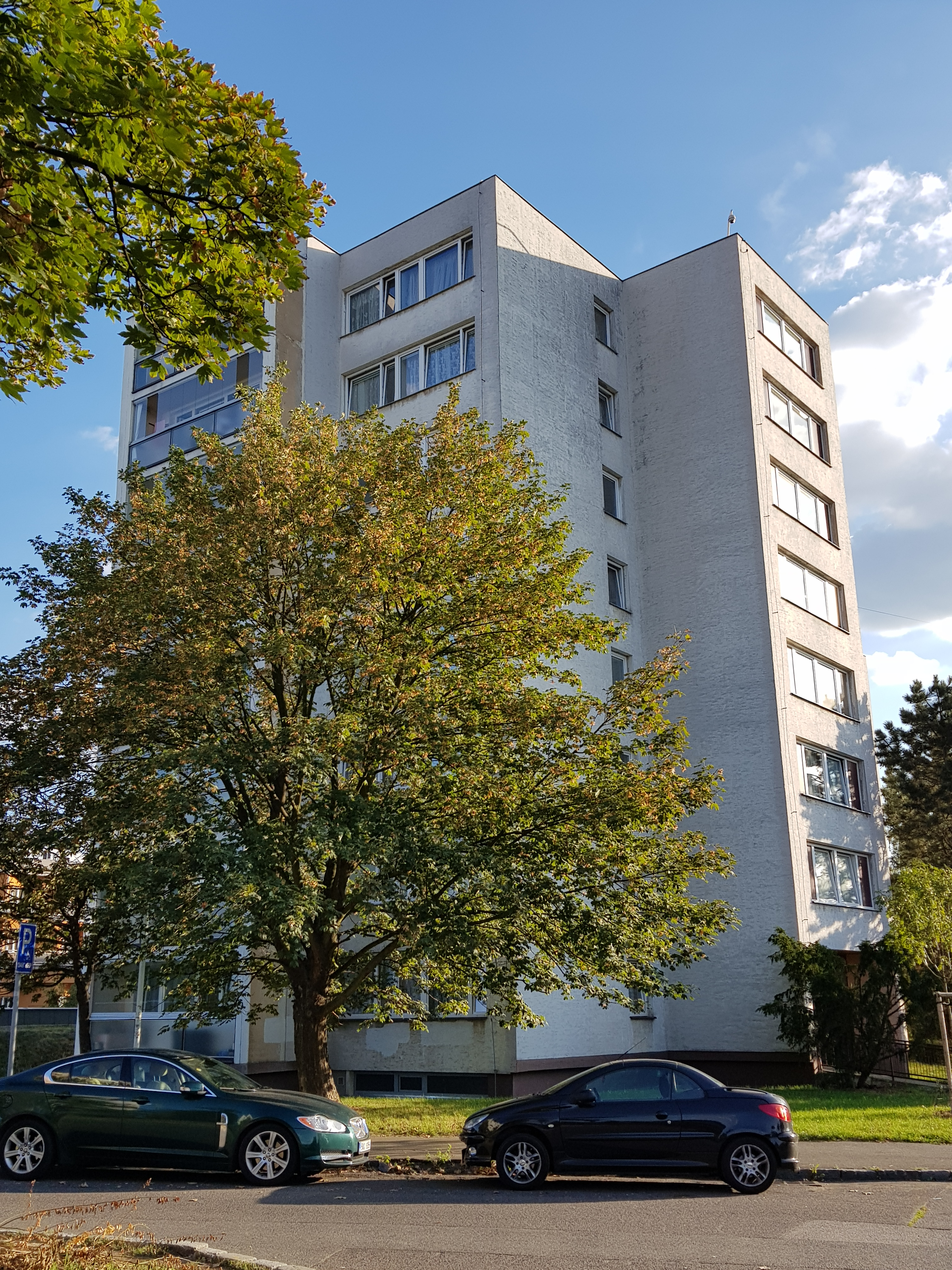 Žárská, Praha 14 - Lehovec, jihozápadní strana